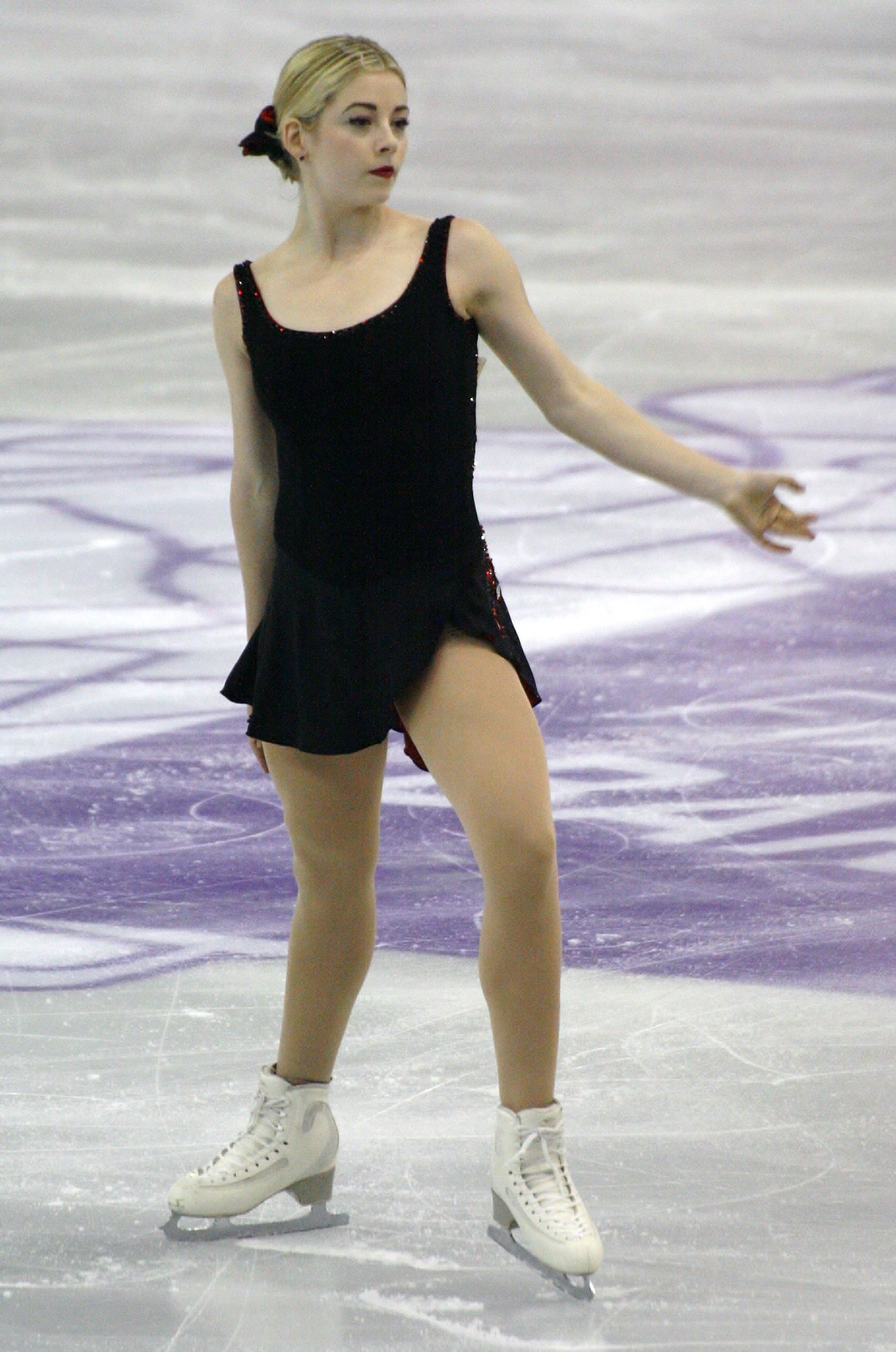 Грейси Голд (США) на финале Гран-при по фигурному катанию 2015-2016.